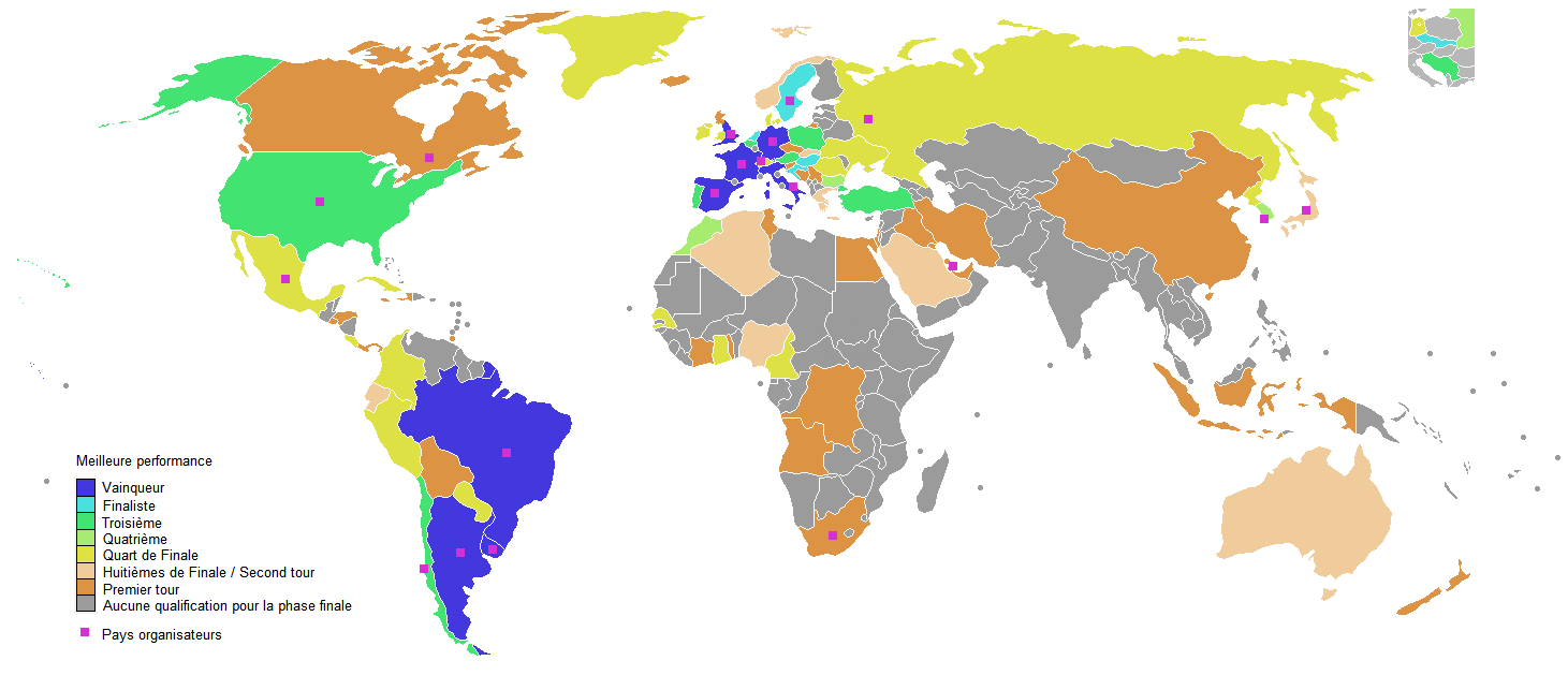 Meilleure performance des équipes pendant la Coupe du monde